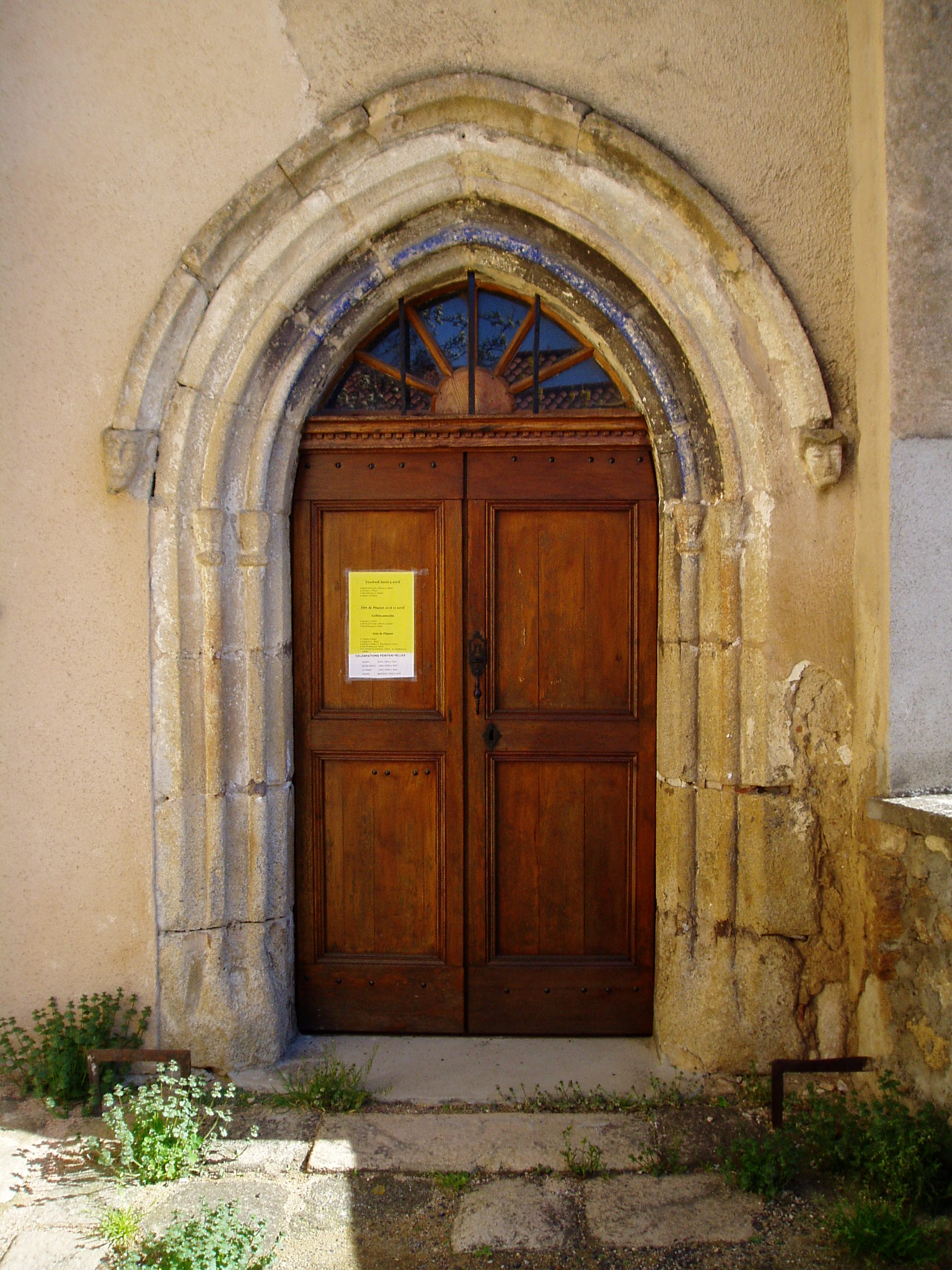 Portail sud, fin 15ème siècle.